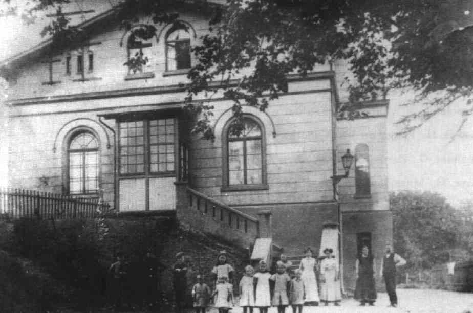 alter (ehemaliger) Bahnhof Baal